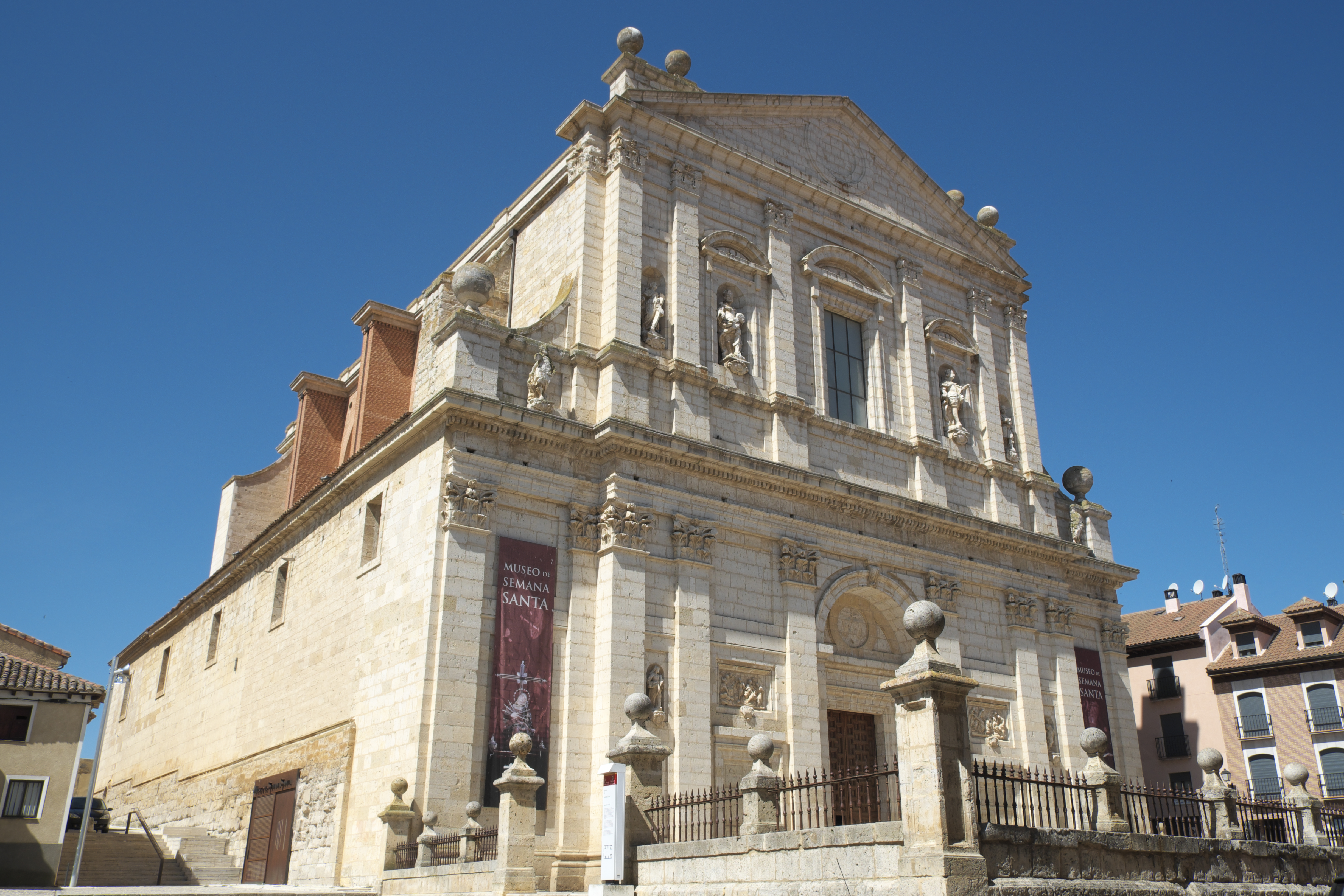 Kirche Santa Cruz in Medina de Rioseco in der Provinz Valladolid (Kastilien-León/Spanien), Museo de la Semana Santa (Museum der Karwoche)